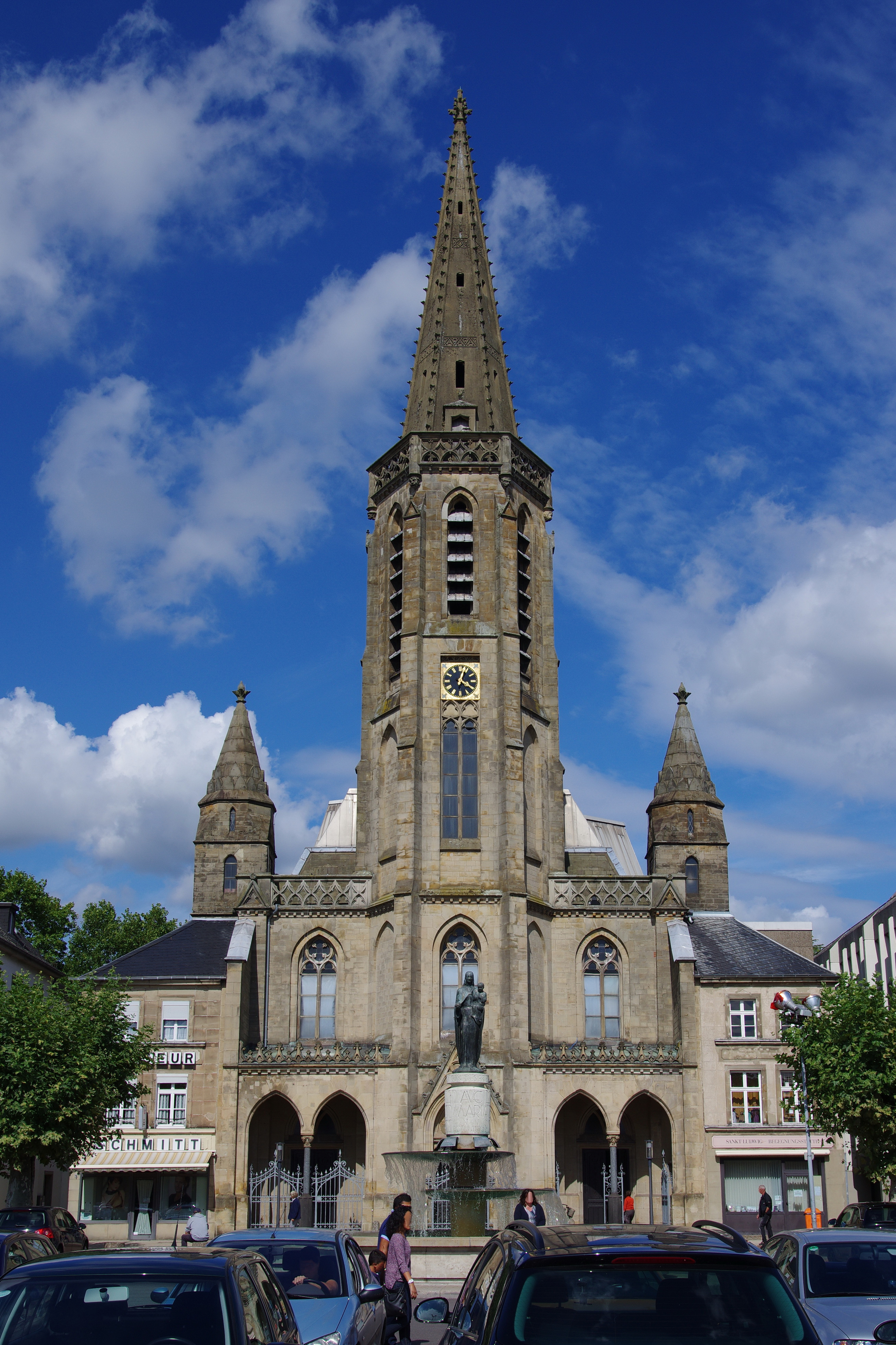 Sankt Ludwig auf dem Großen Markt in Saarlouis